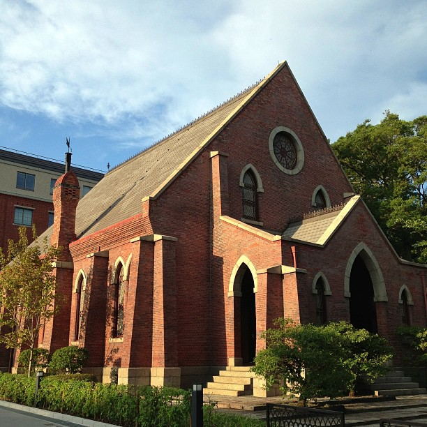 同志社礼拝堂（同志社大学今出川校地）